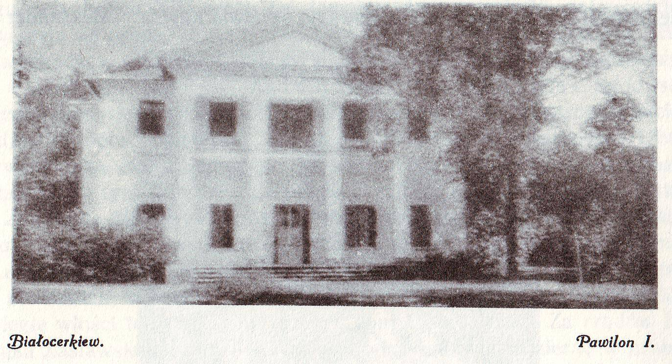 Białocerkiew